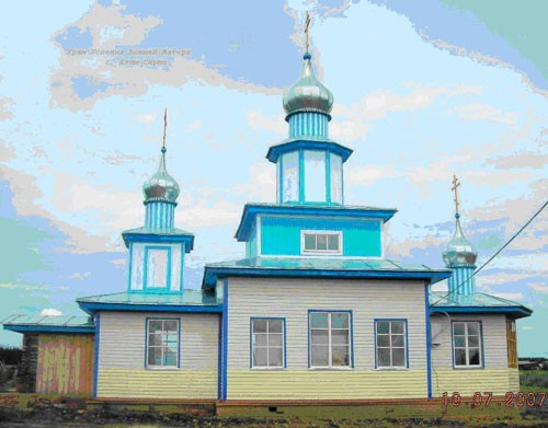 Храм Успения Божией Матери расположен в центре села Азим-Сирма на пересечении улиц Советская и Складская. Храм однопрестольный, трехкупольный, деревянный, обшит сайдингом бело-голубого цвета. Имеется колокольня. Храм освящен 2007 году епископом Савватием Алатырским, викарием Чебоксарской епархии.Богослужение совершаюется обычно по субботам каждую неделю.